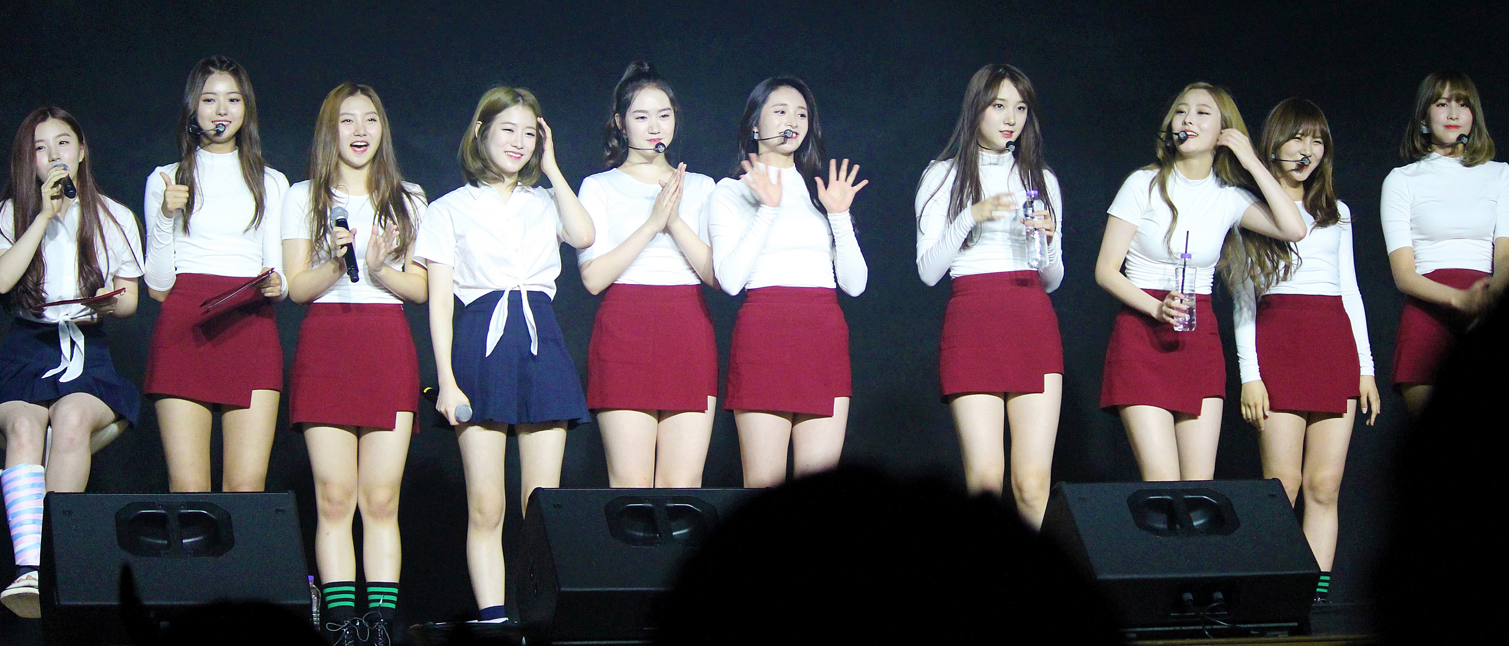 160625 플레디스걸즈 콘서트 임나영 김민경 강경원 강예빈 배성연 김예원 박시연 카일라 직찍